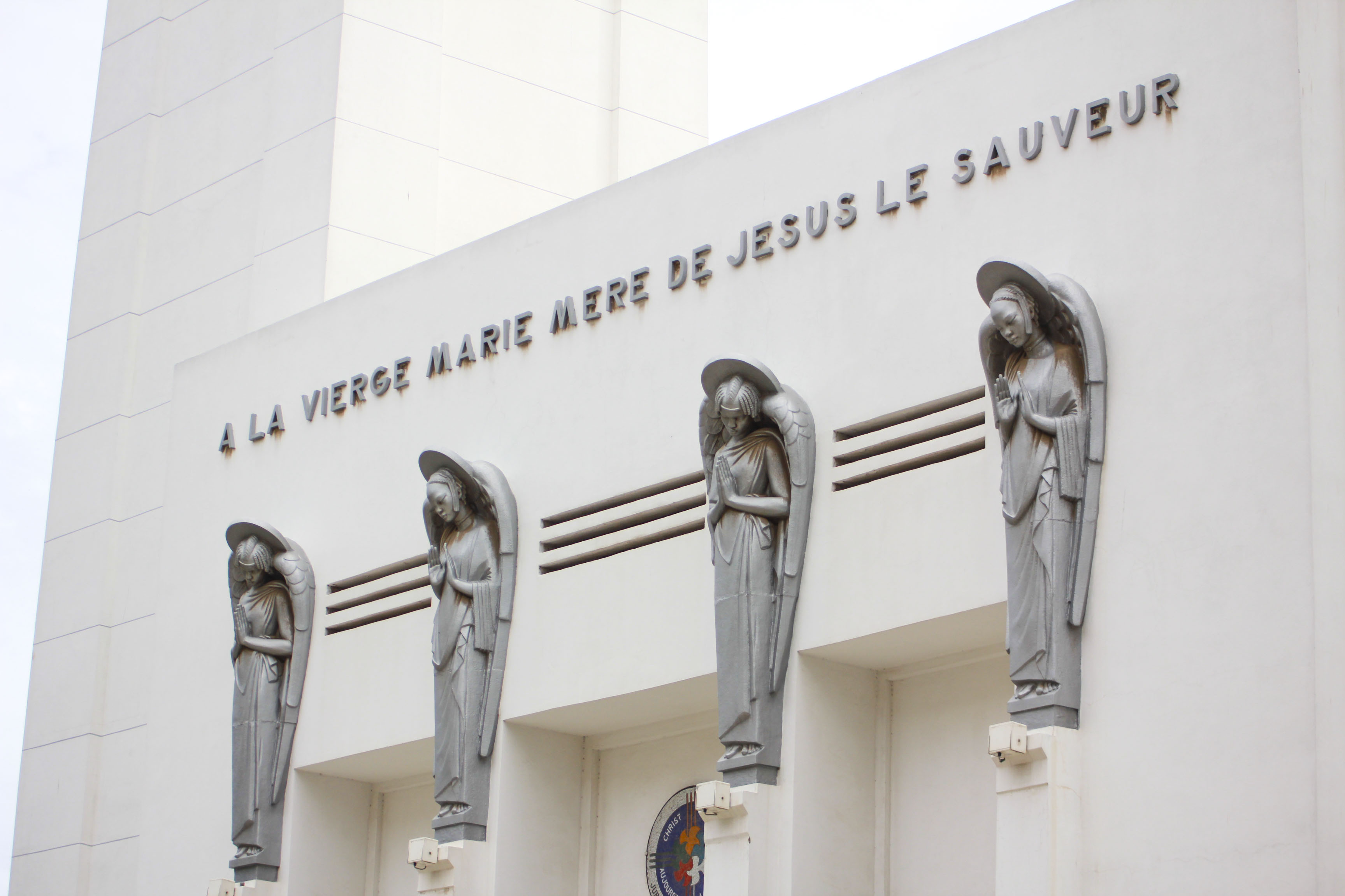 Photo: Lamine Niang Caryatid Angels sculpted by the French artist Anna Quinquand in 1936 for Dakar's Our Lady of Victories Cathedral